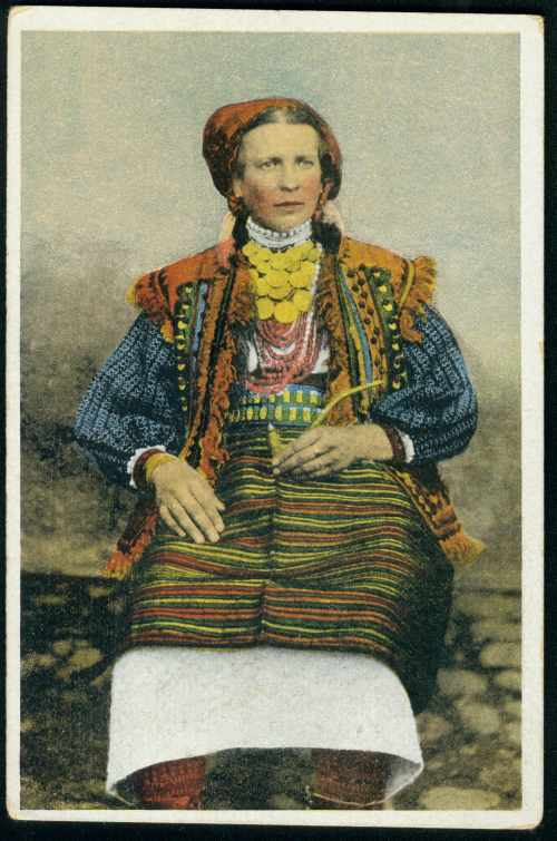 Гуцулка у святковому одязі: Гуцулка у святковому одязі. Передрук з видання Я. Оренштайна. Коломия, 1900-ті рр. Із комплекту поштівок "Гуцули, бойки, лемки" (збірка Петра Арсенича). Видавництво "Нова Зоря" (м. Івано-Франківськ).